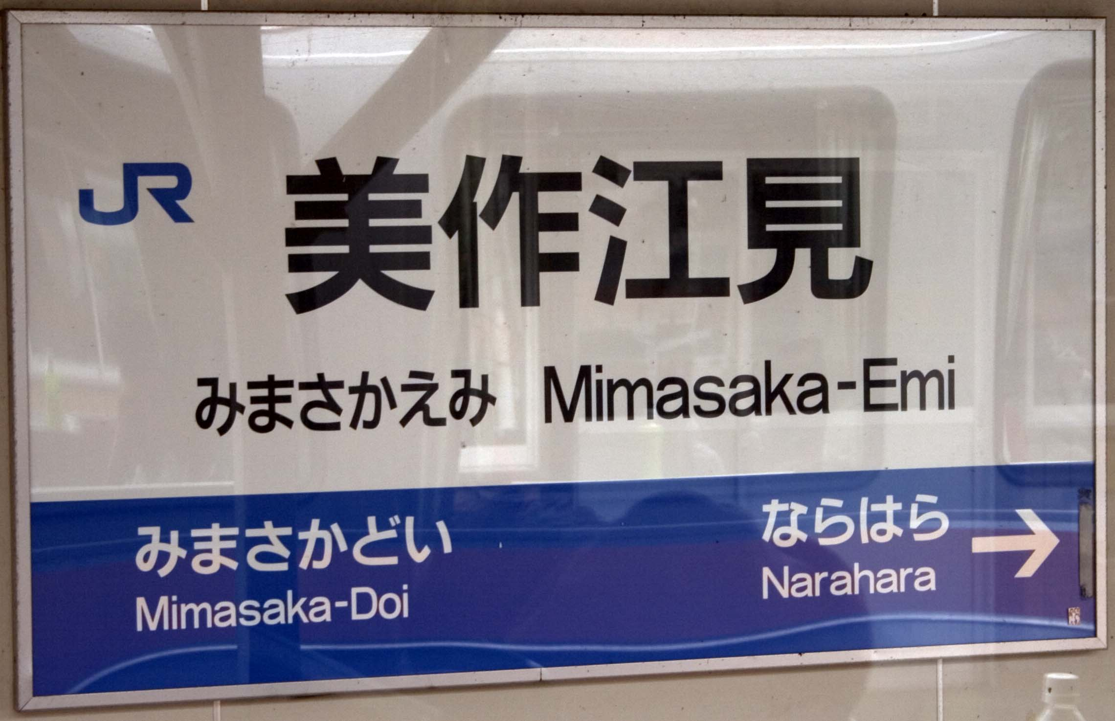 JR美作江見駅の名標